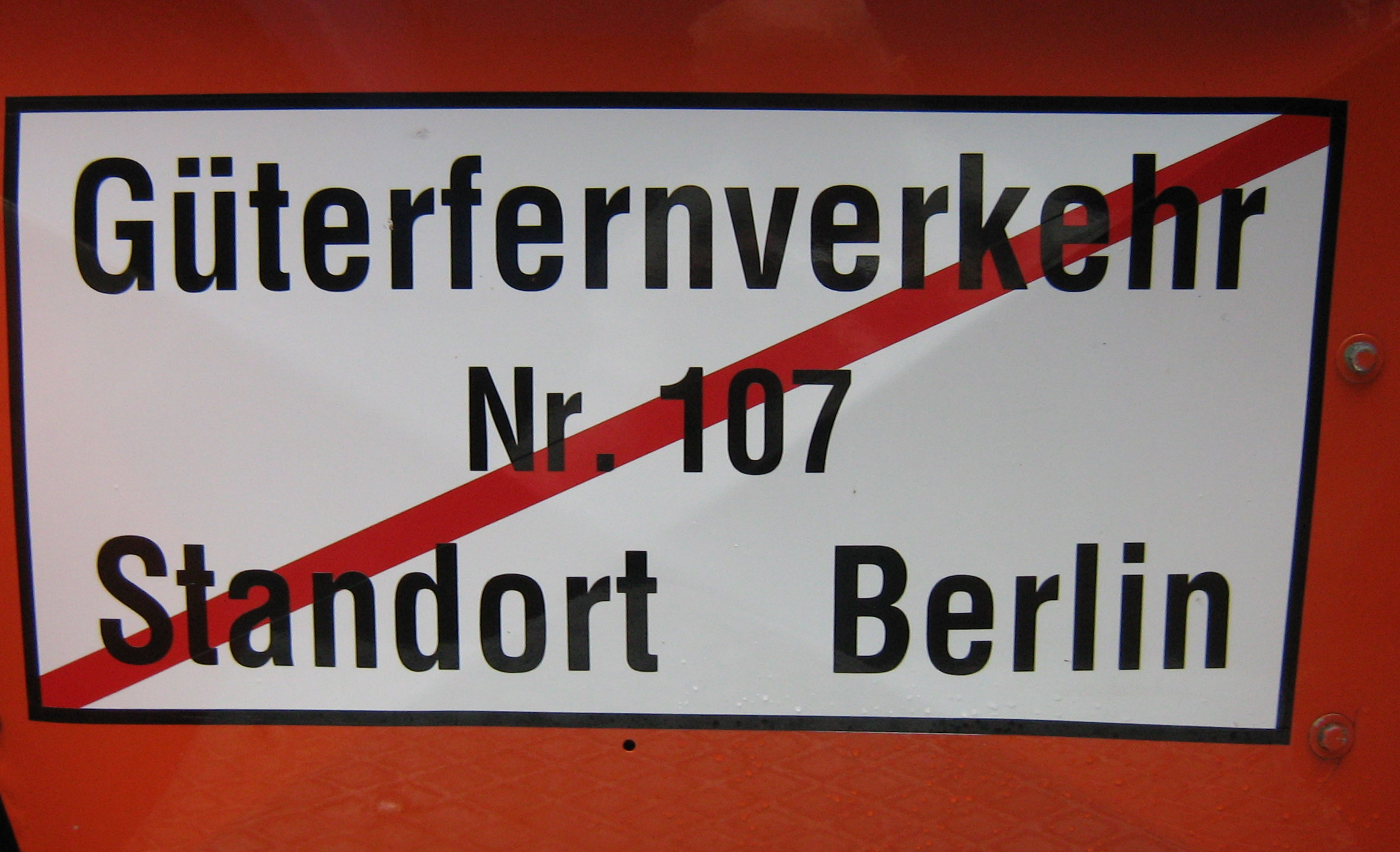 gesetzliche Vorschrift bis 1973 nach dem GüKG (Güerkraftverkehrgesetz)